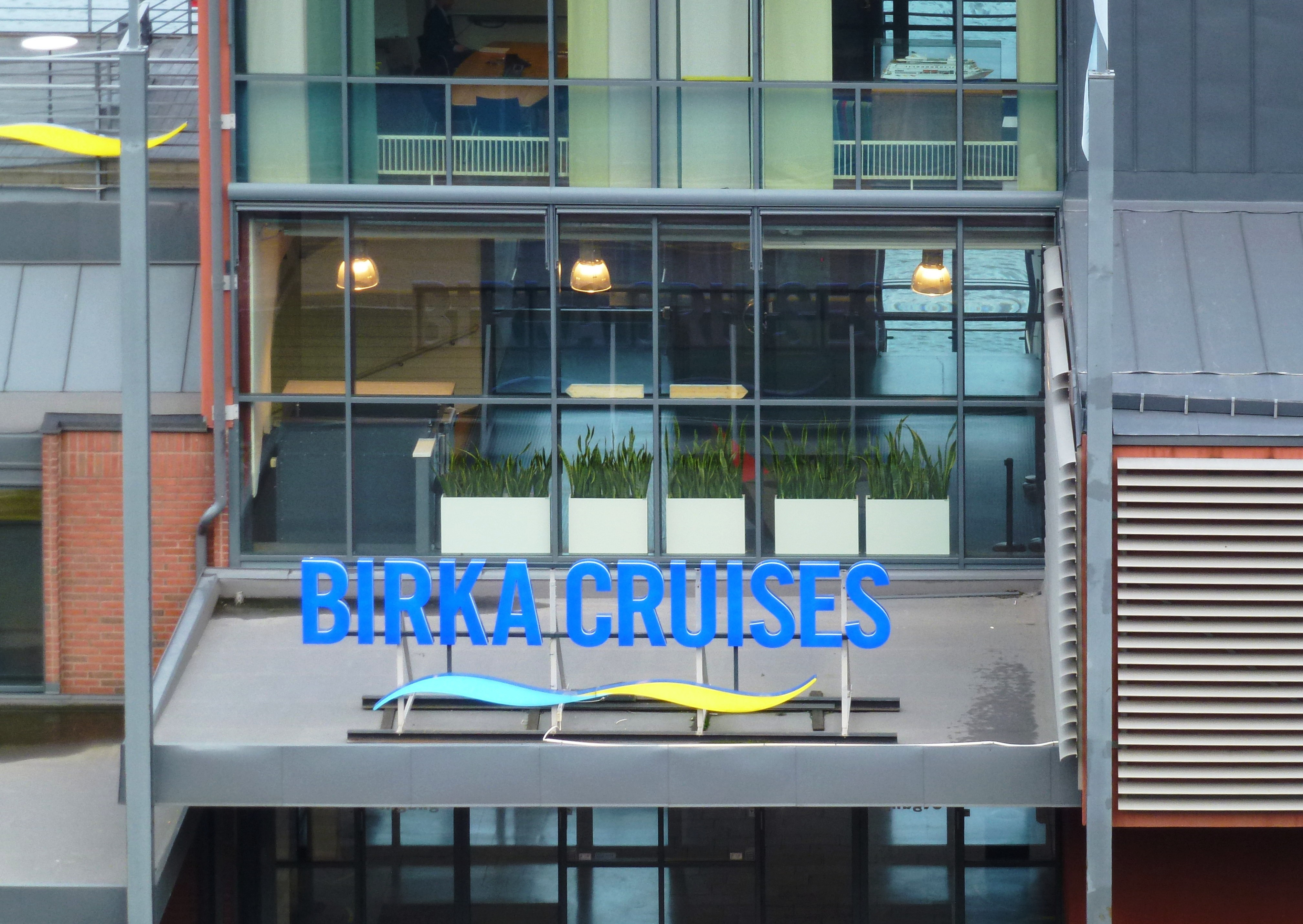 Stadsgårdsterminalen (Birkaterminalen), entré